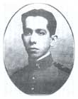 Rodolpho Albino Dias da Silva (1889 - 1931). Fotografia tirada no início de sua carreira.